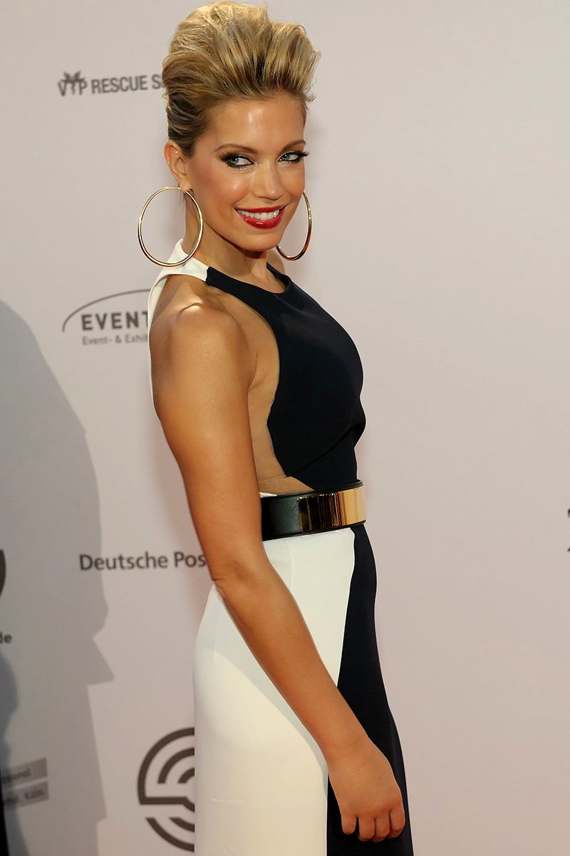 Sylvie van der Vaart (2012)